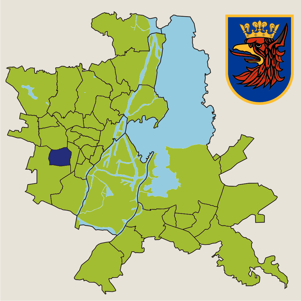 Osiedle "Świerczewo" w Szczecinie – jednostka pomocnicza miasta w 2010